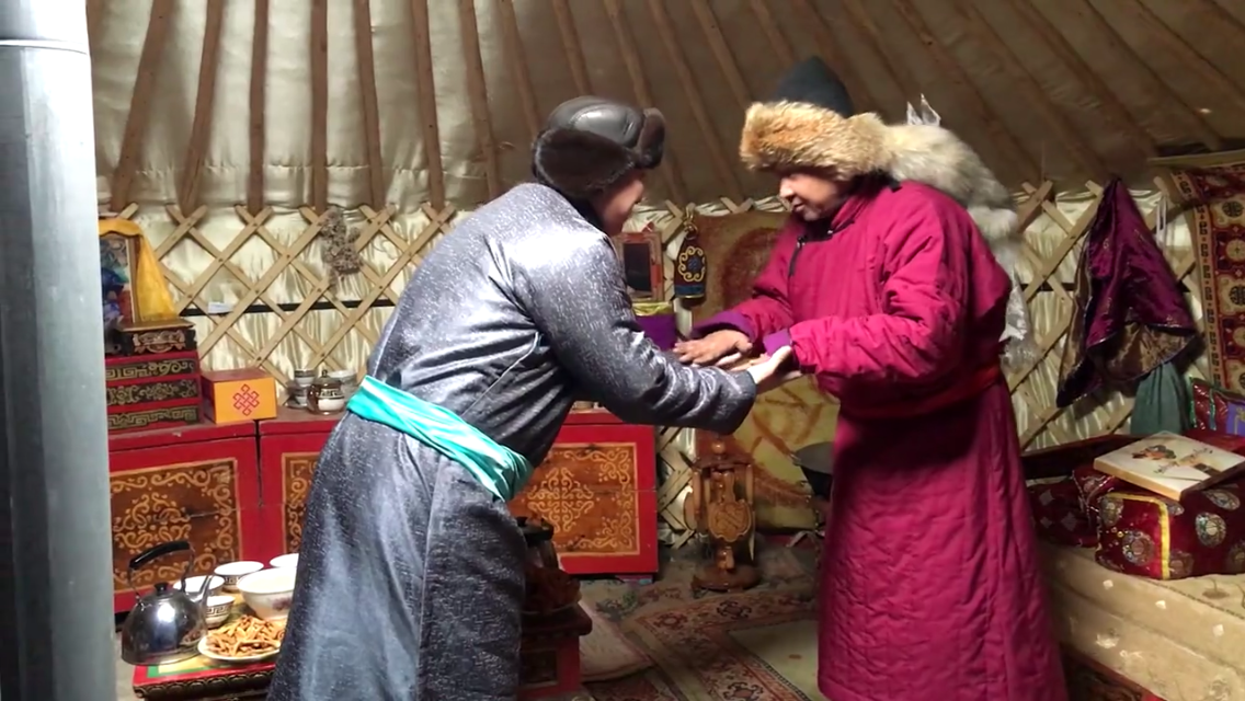 Обряд чолукшуур